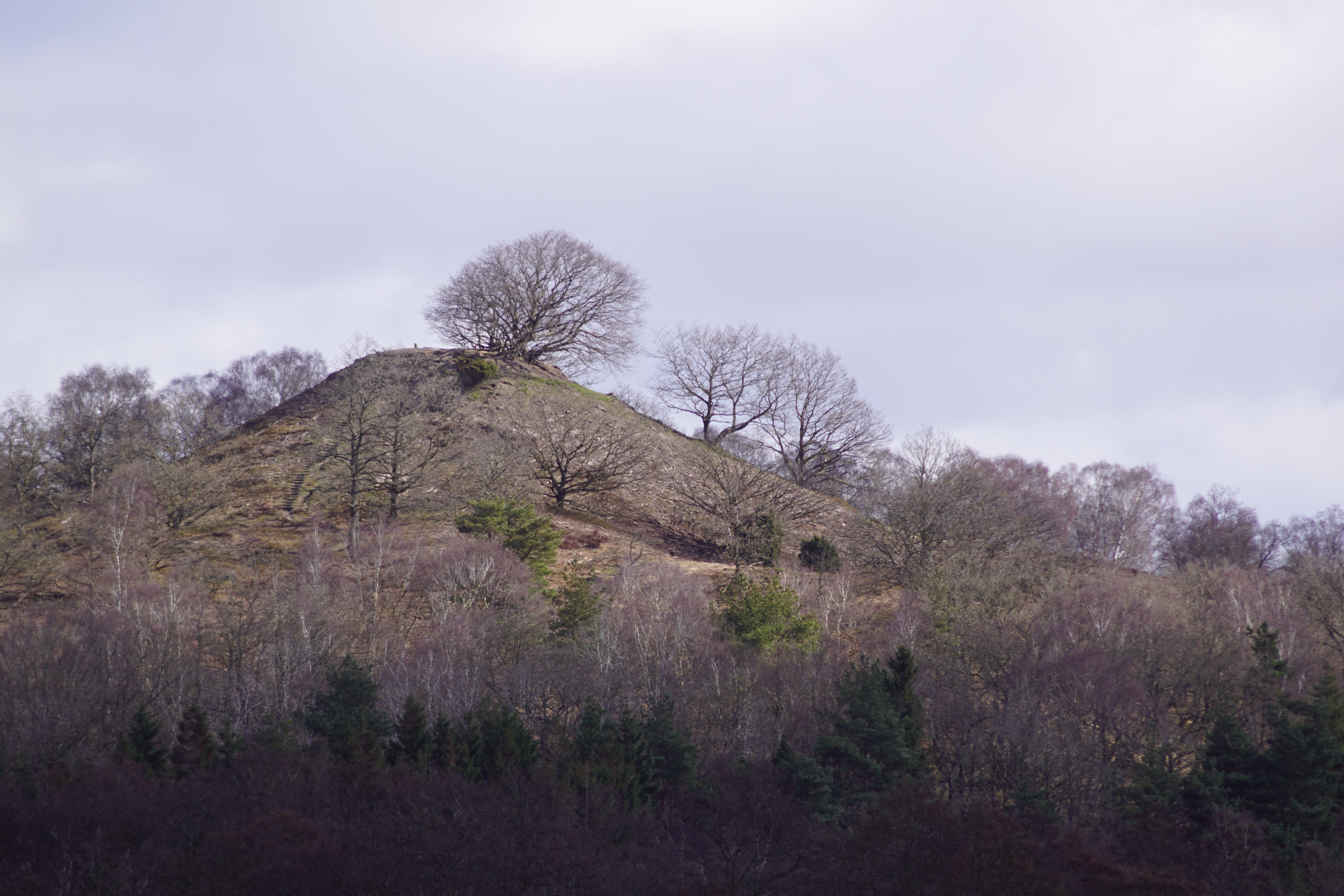 Store troldhøj i Gjern Bakker set fra Sminge